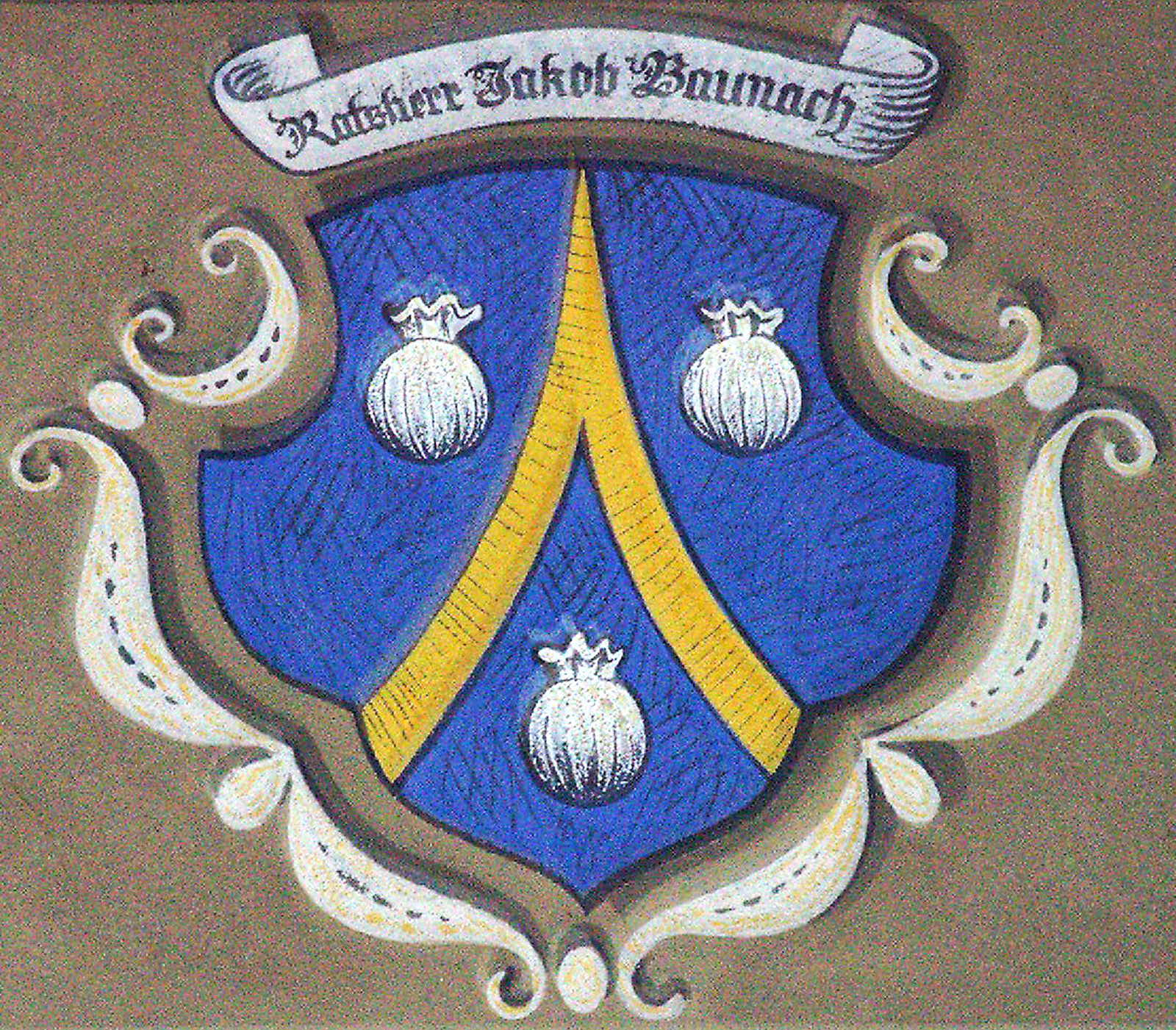 Wappen des Jakob Baunach († 23. August 1627) im Innenhof des Rathauses Würzburg. Die drei dargestellten Geldsäcke zeugen von dem Reichtum des später als Hexer geköpften und verbrannten Helmstädters, der zuvor das Amt des Ersten Bürgermeisters bekleidete.